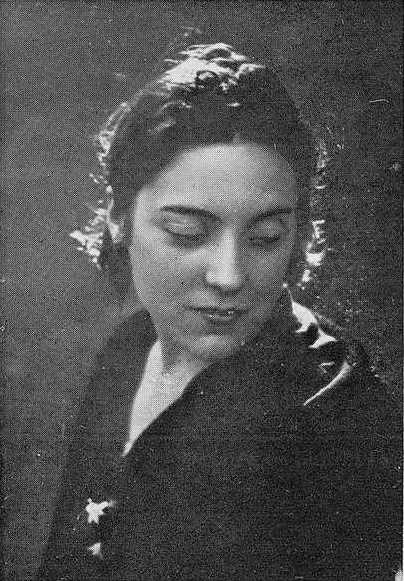 Lolita Díaz Baliño, fotografía en Vida Gallega 1929